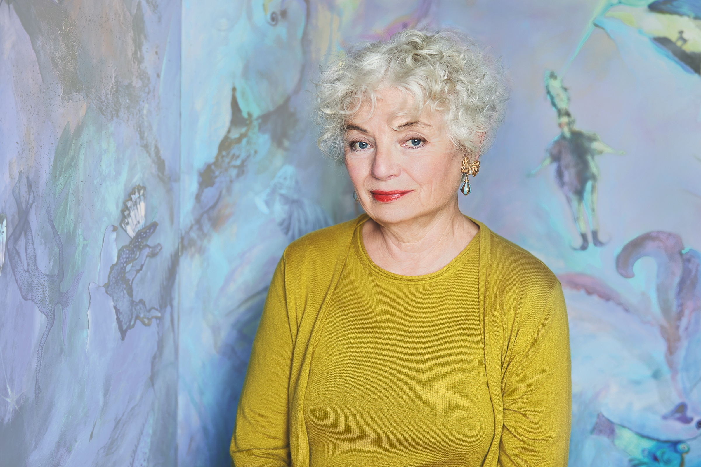 Tatjana Hauptmann